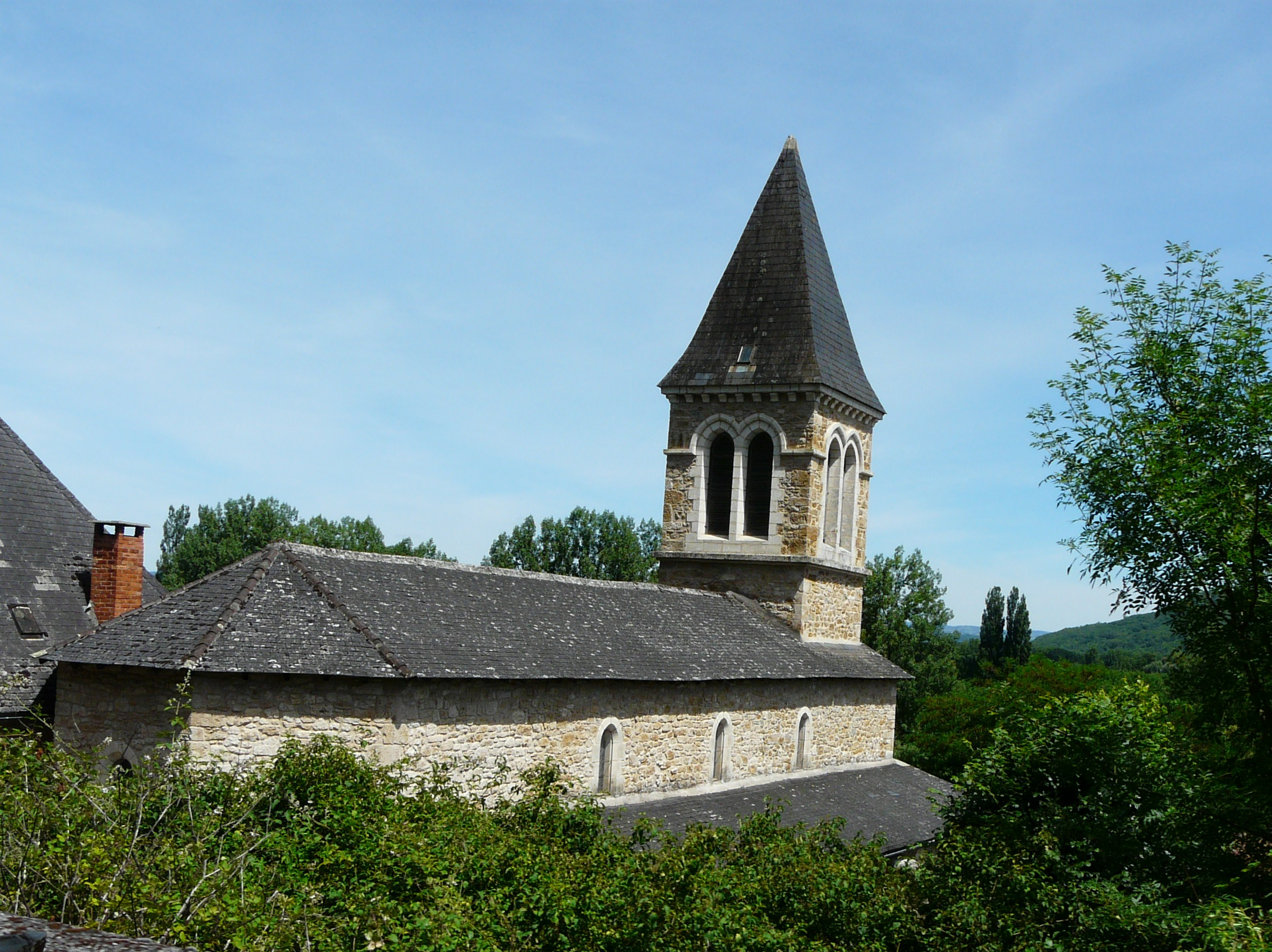 L'église de Saint-Denis-lès-Martel, Lot, France.